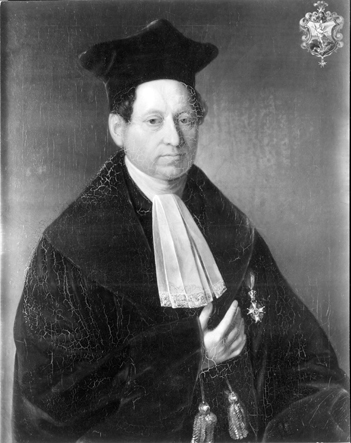 Porträt des Tübinger Professors der Rechte Adolph Michaelis (1797–1863)